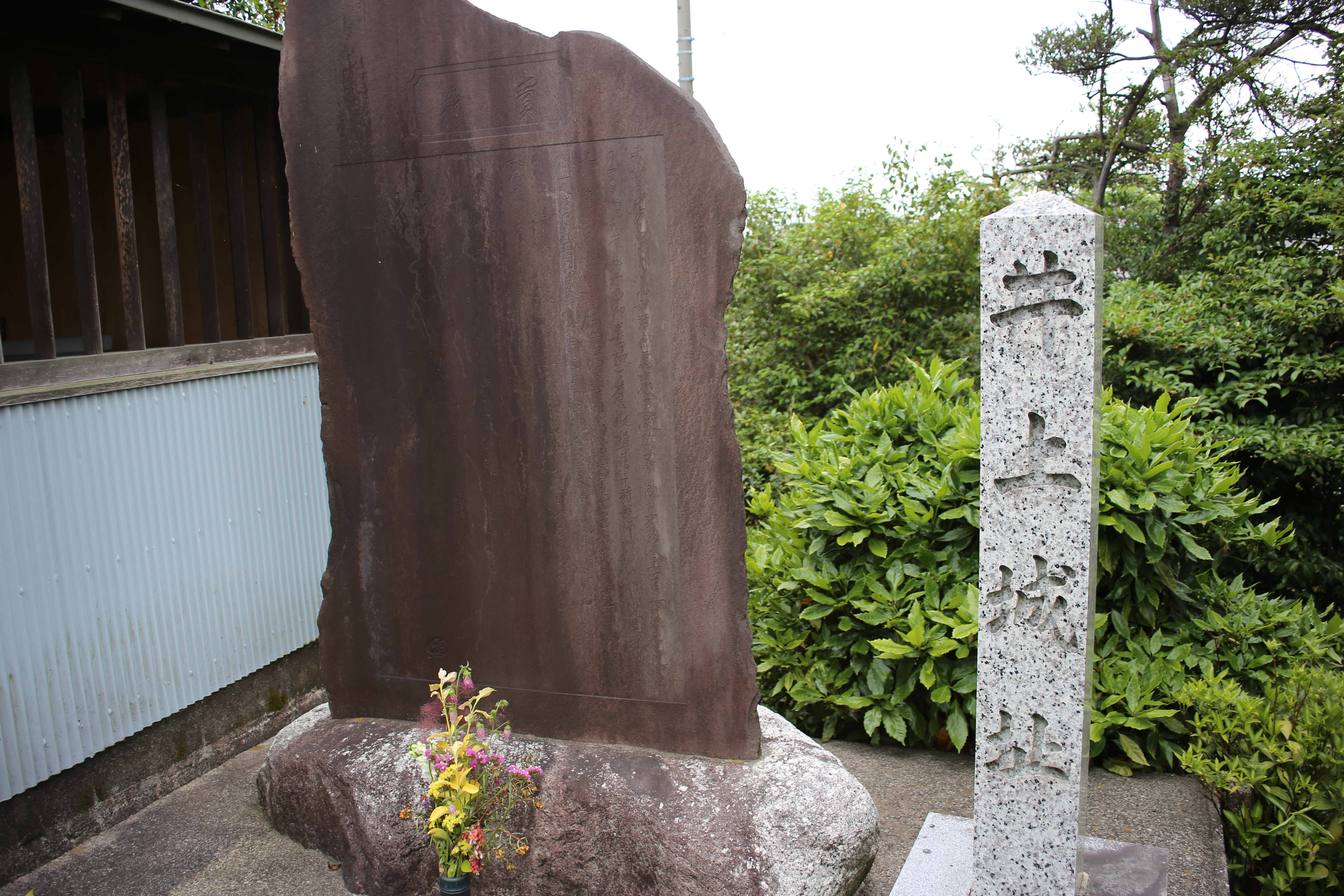 愛知県岩倉市井上町井出北の井上城址